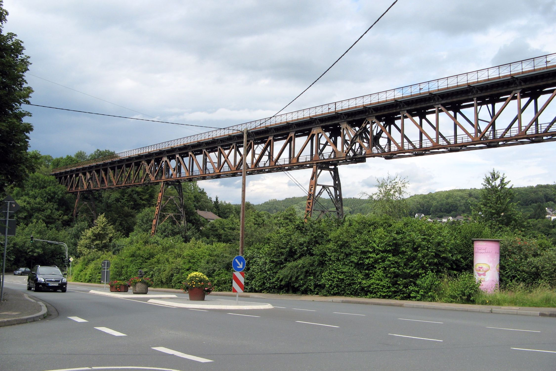 Eisenbahnbrücke in Westerburg, Stahlkonstruktion, erbaut 1906/07, Höhe 31m